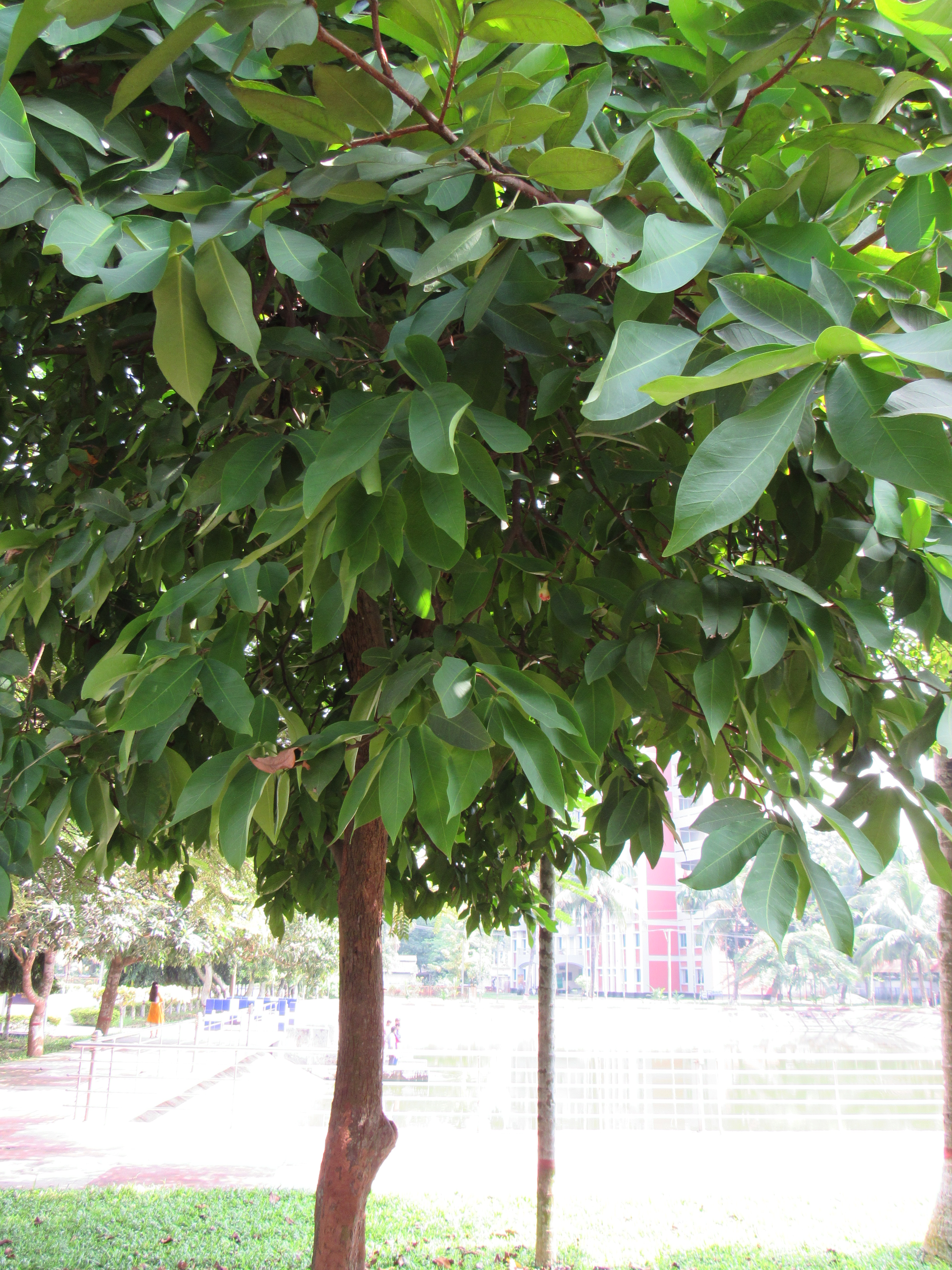 Syzygium samarangense (Rose apple) tree in RDA, Bogra